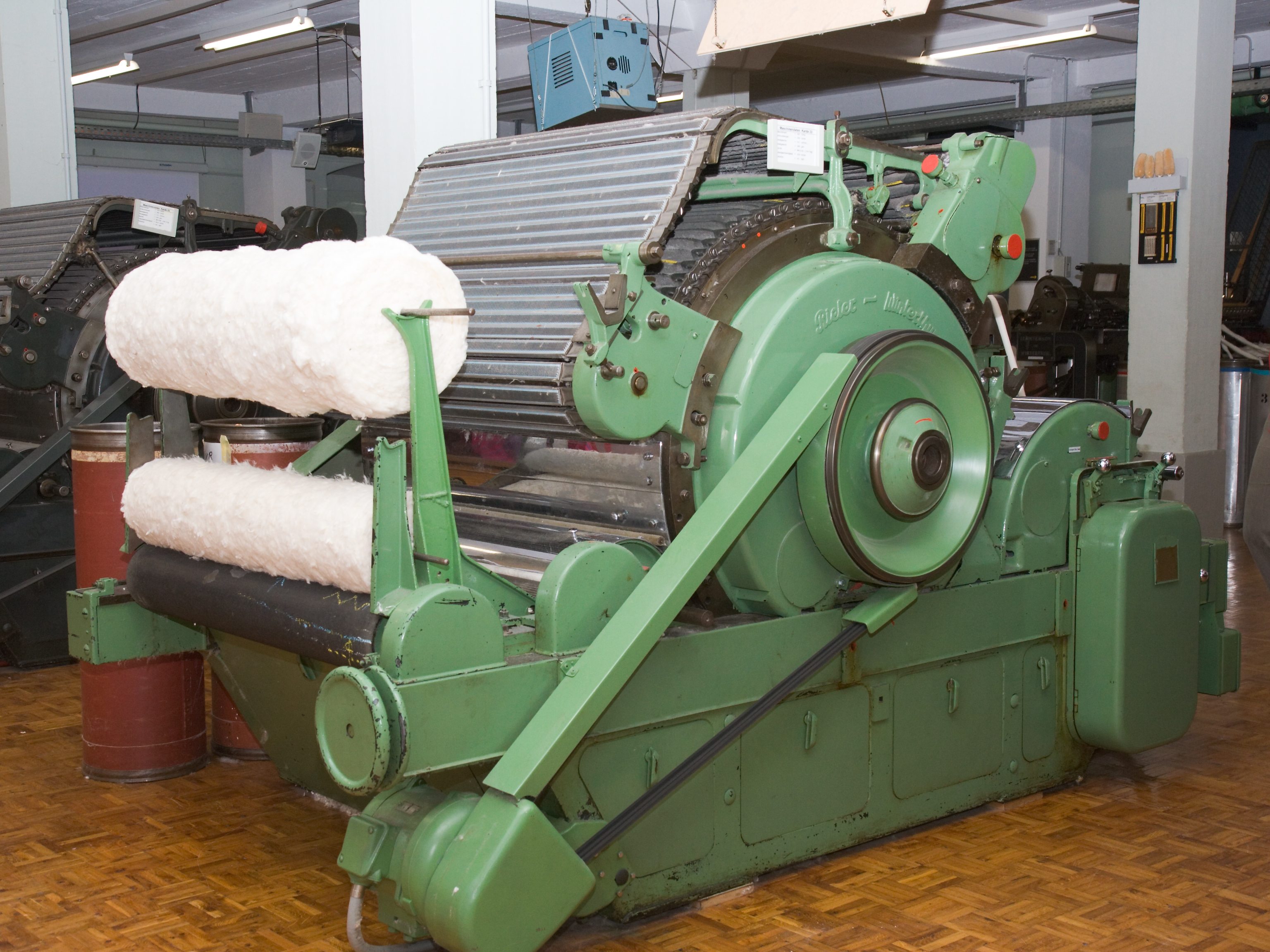 Karde von Rieter, Modell 1933, gebaut 1939 für die Landi